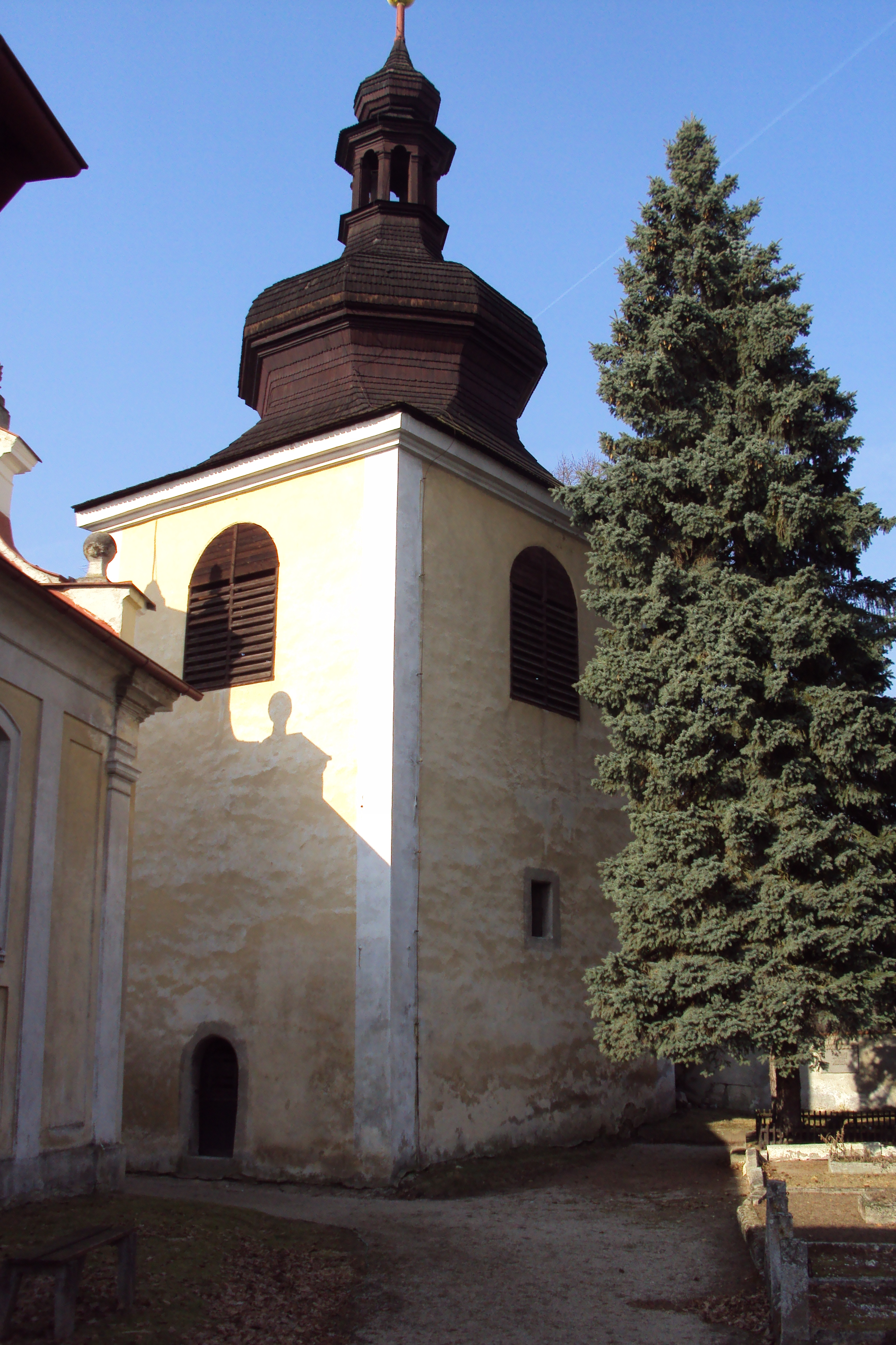 Věž zvonice u kostela svaté Barbory poblíž Zahrádek na Českolipsku